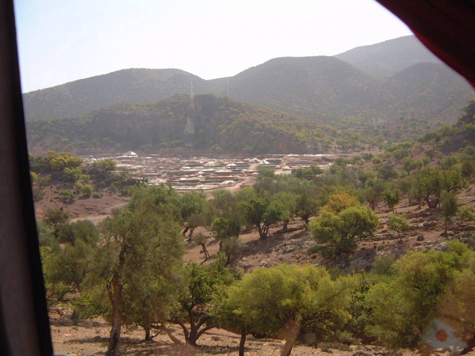 Plantation d'arganiers et salines entre Agadir et Essaouira